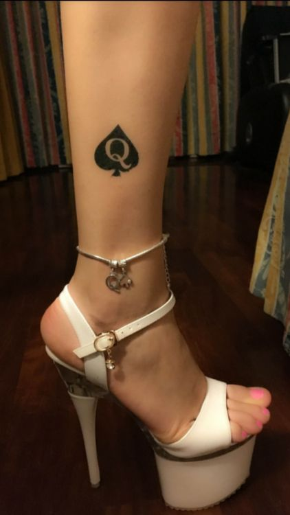 Tatuagem do símbolo de Queen of Spades ou Dama de Espadas